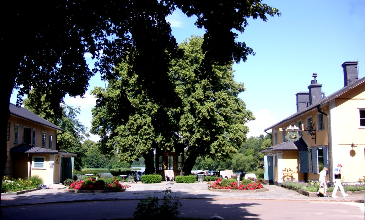 Stallmästaregården, blick mot Brunnsviken